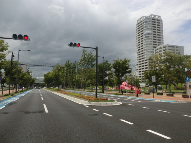 福岡県北九州市にある清張通りです。この地で育った松本清張にちなんでいます。